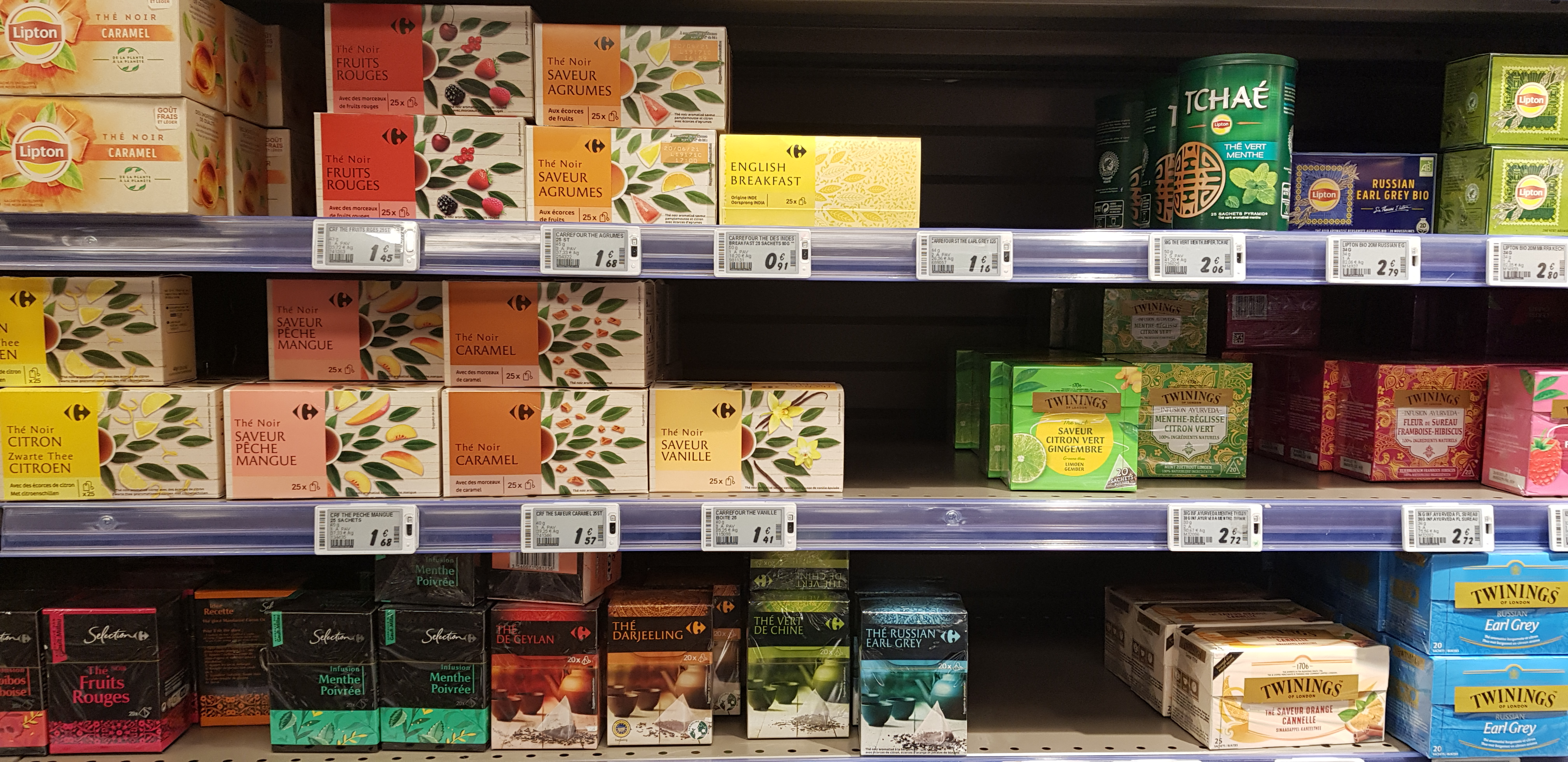 rayon thé d'un supermarché parisien